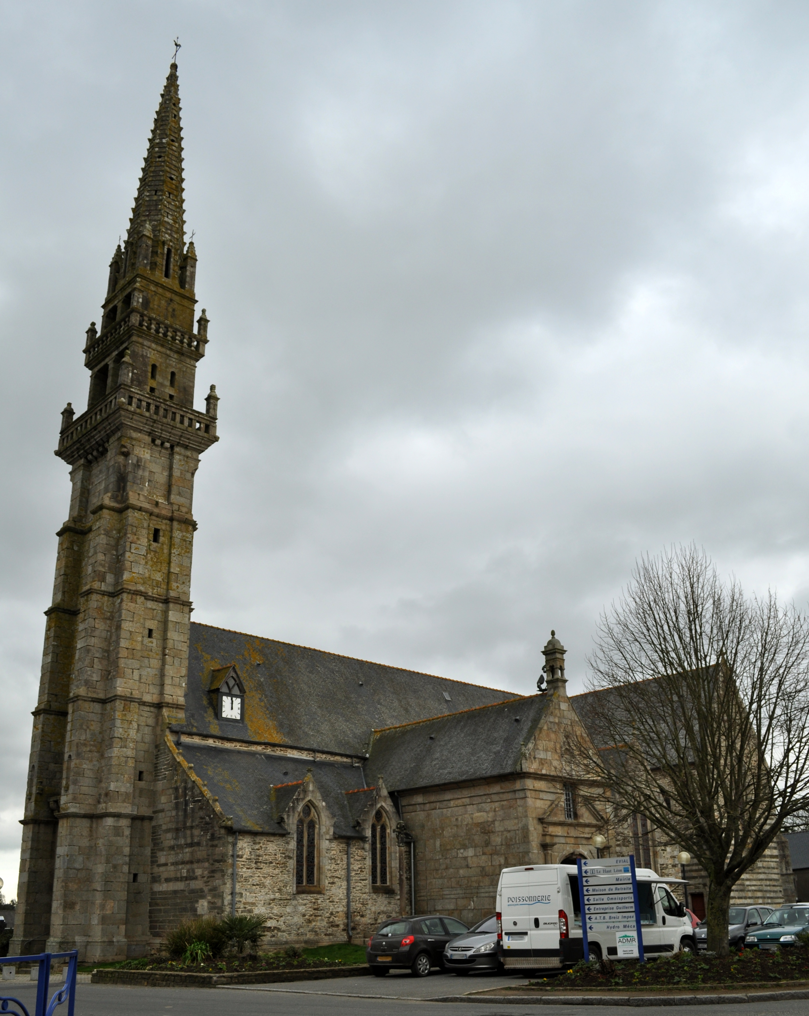 Iliz Plouvorn